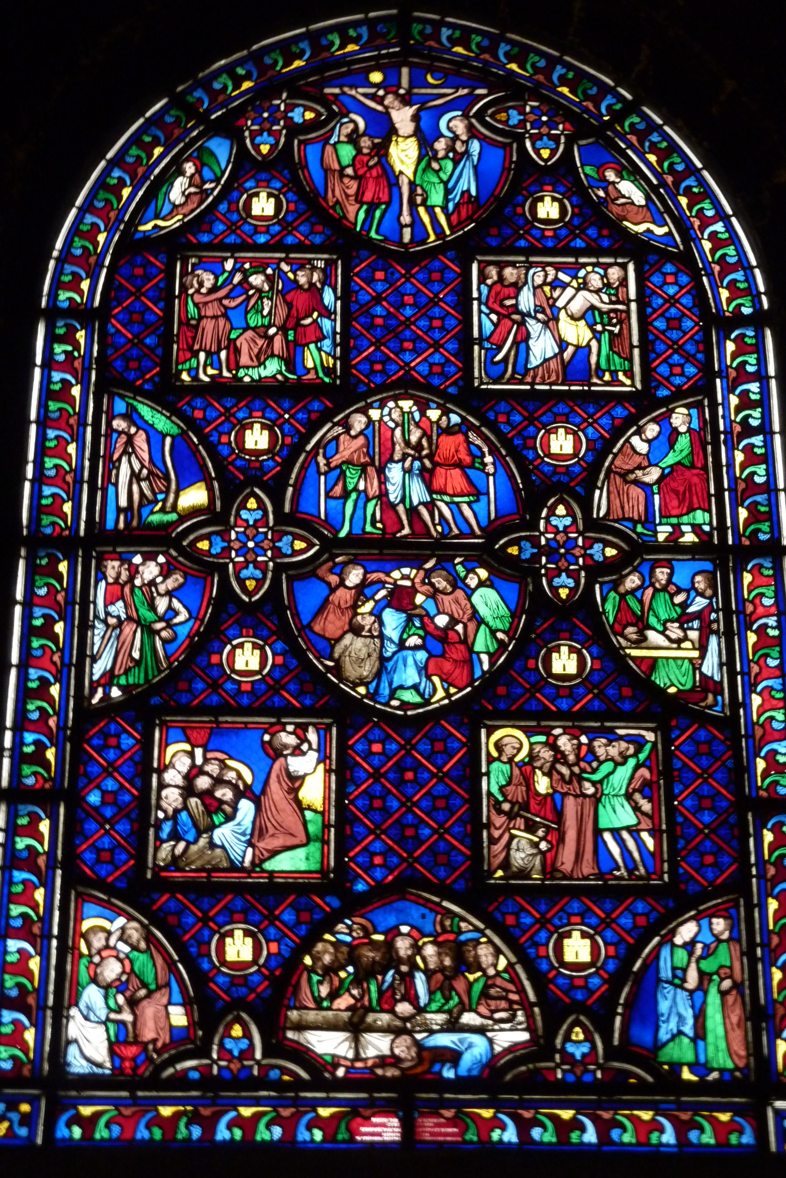 Bleiglasfenster in der Kirche Saint-Germain-l'Auxerrois in Paris, Darstellung: Passion Christi; 1838 hergestellt von Louis Steinheil und Reboulleau, Entwurf: Jean-Baptiste Lassus und Adolphe Napoléon Didron (siehe Élisabeth Pillet: Le vitrail à Paris au XIXe siècle. Entretenir, conserver, restaurer, (Corpus Vitrearum France - Études IX) Presses Universitaires de Rennes, Rennes 2010, S. 86f, ISBN 978-2-7535-0945-0)